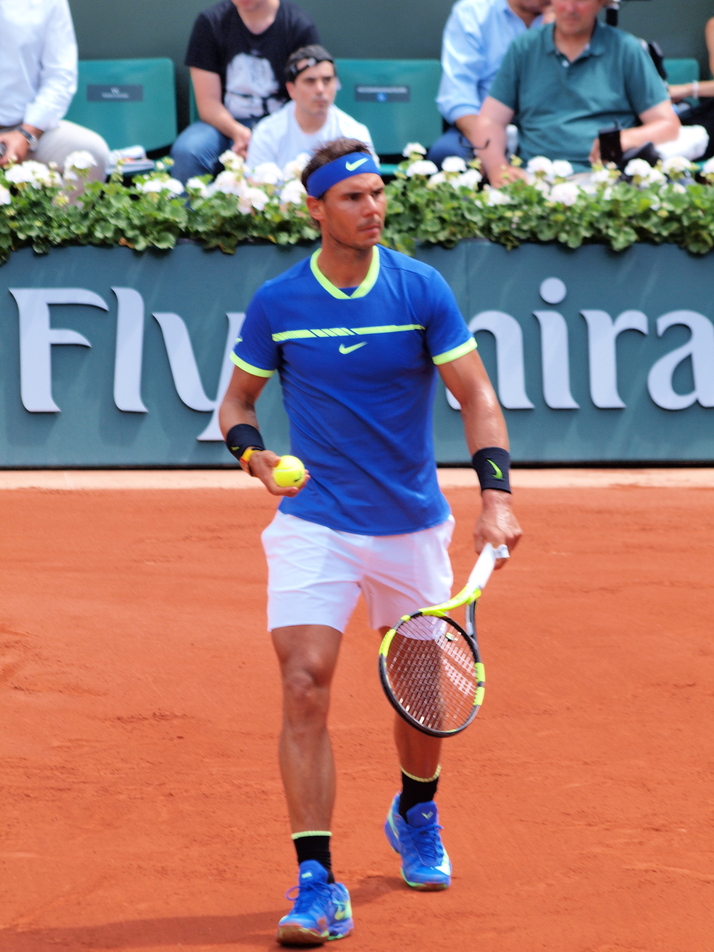 Rafael Nadal lors des Internationaux de France de Tennis au stade Roland Garros de Paris, le 2 juin 2017, durant le match contre Nikoloz Basilashvili.